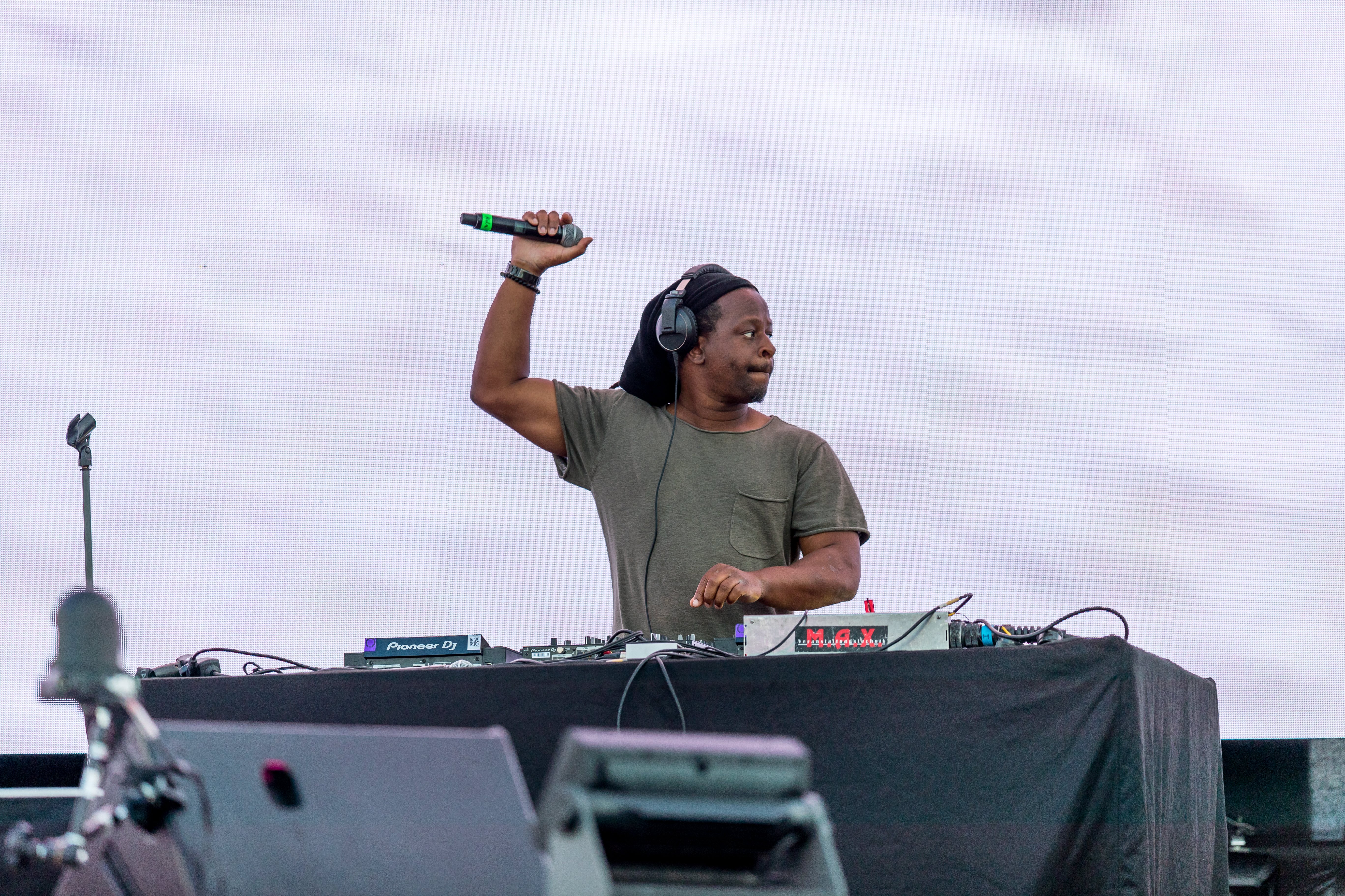 Die Pochers hier! during CARStival at Maimarktgelände, Mannheim, Baden-Württemberg, Germany on 2020-07-05, Photo: Sven Mandel Promotion: go7.ag